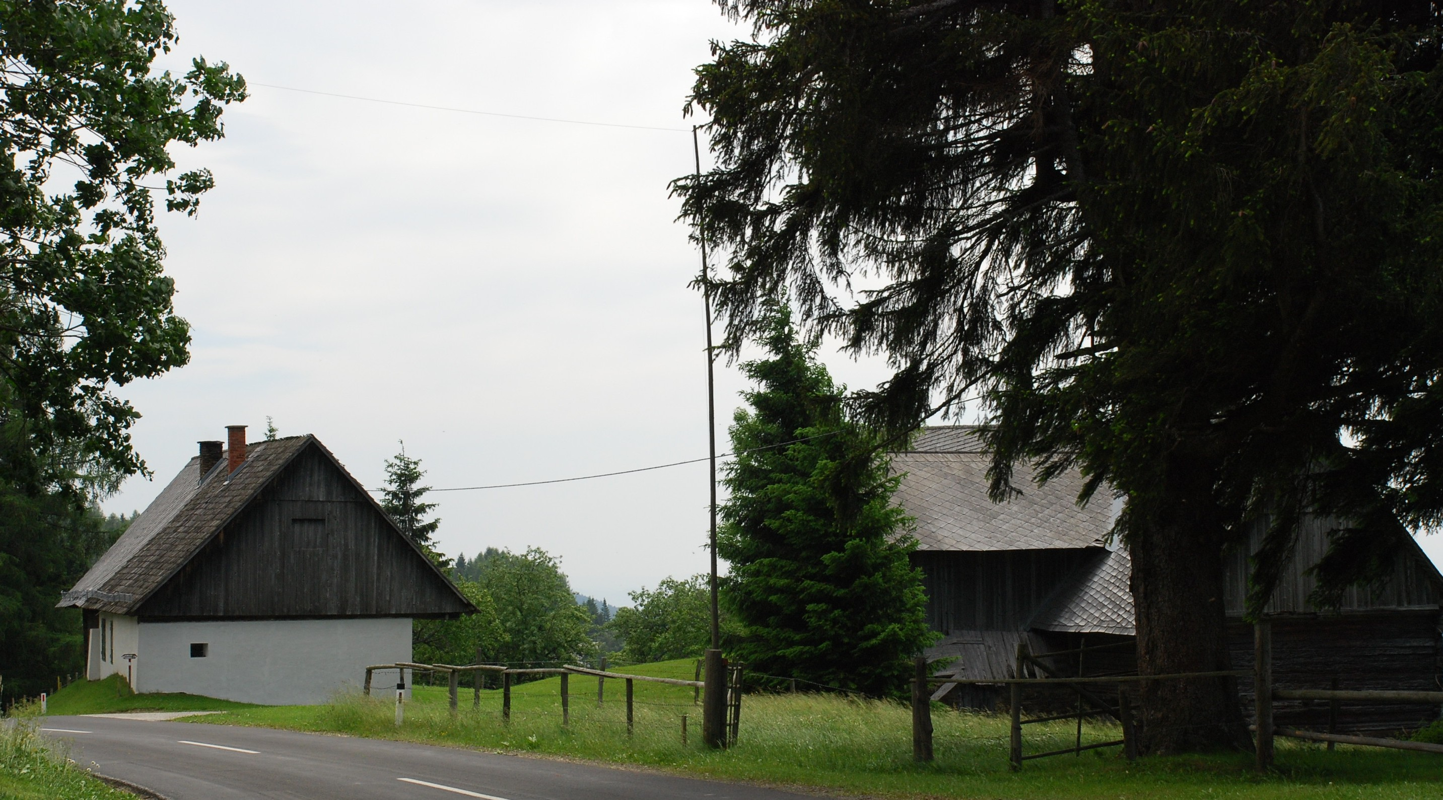 Alter Paarhof, Weststeiermark (vlg. Ircher, Rettenbach, Kloster)